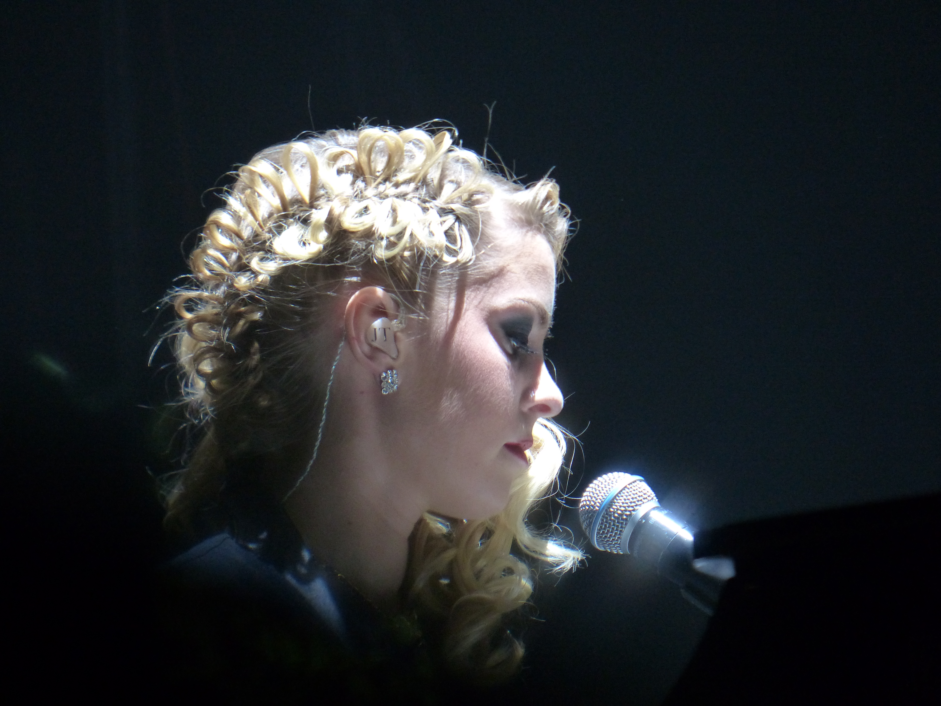 Jasmin Tawil am Klavier beim Adel Tawil Konzert, am 01.04.2014 in der Lanxess Arena Köln